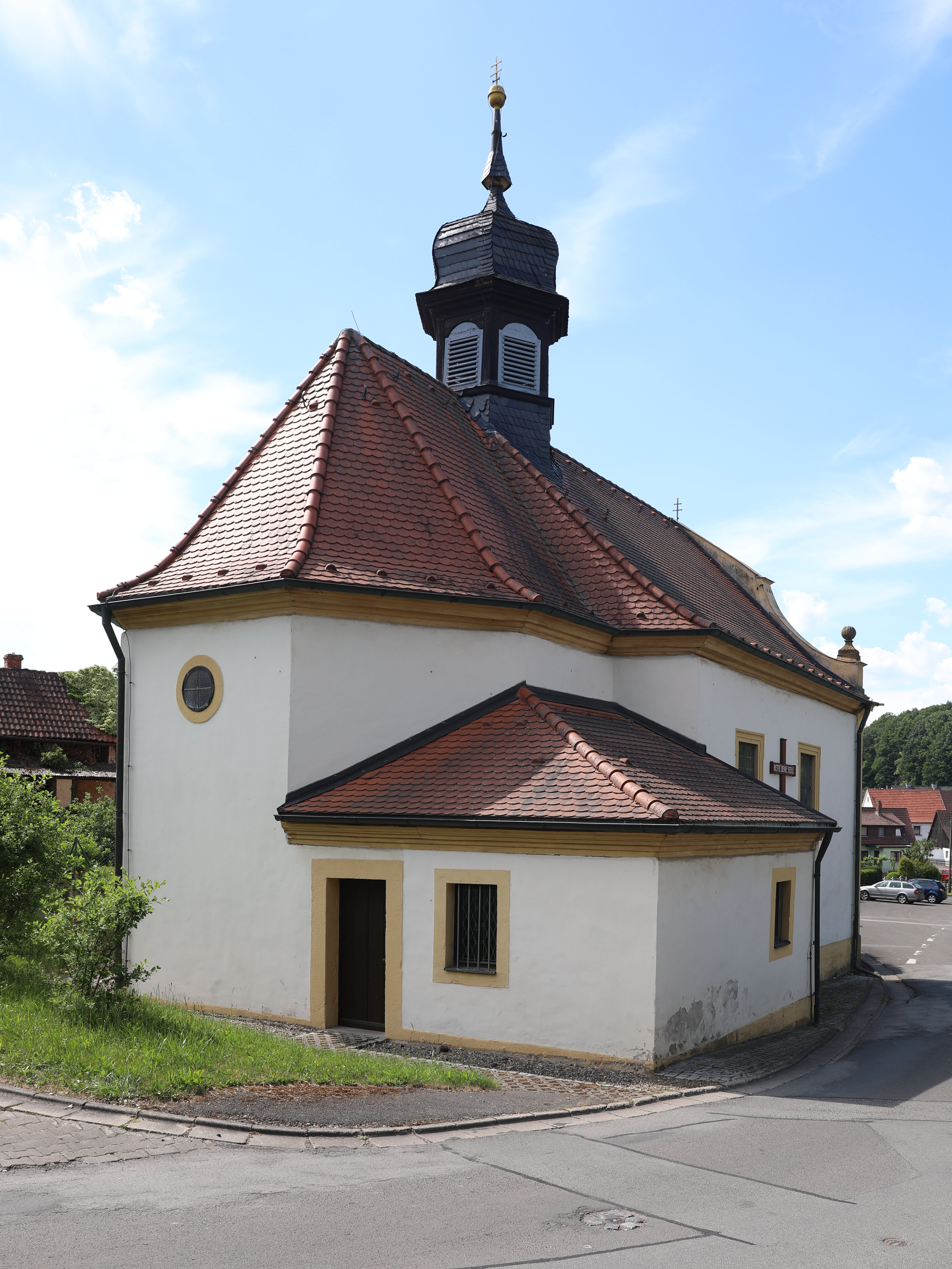 Vorbach, katholische Filialkirche St. Johannes der Täufer